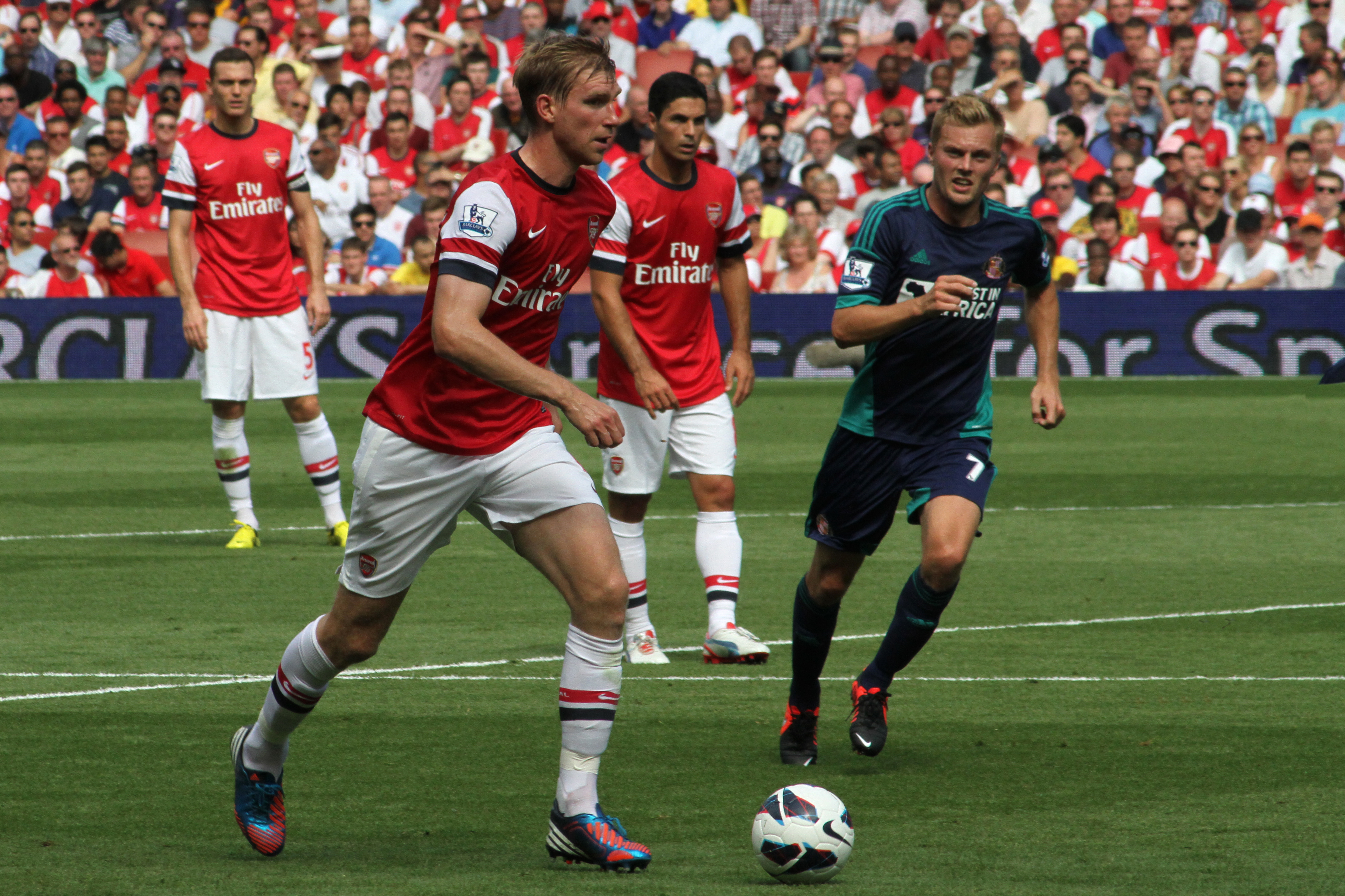 Per Mertesacker & Seb Larsson